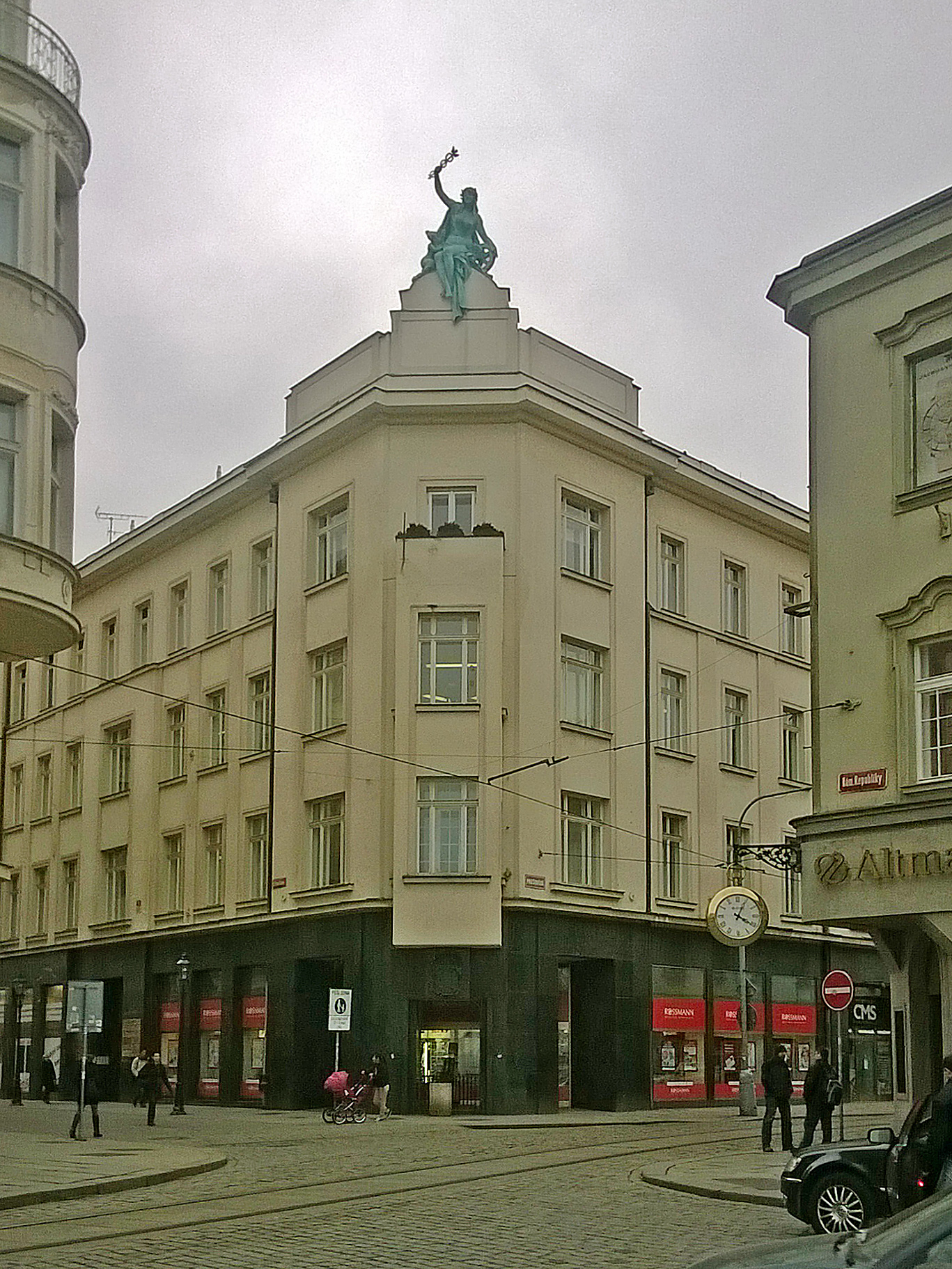 Roh Domu U Zlatého Soudku v Plzni